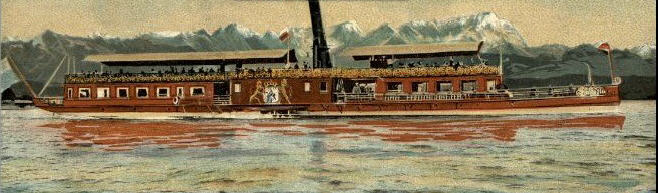 Salondampfer Luitpold auf dem Starnberger See, Ausschnitt aus einer Ansichtskarte